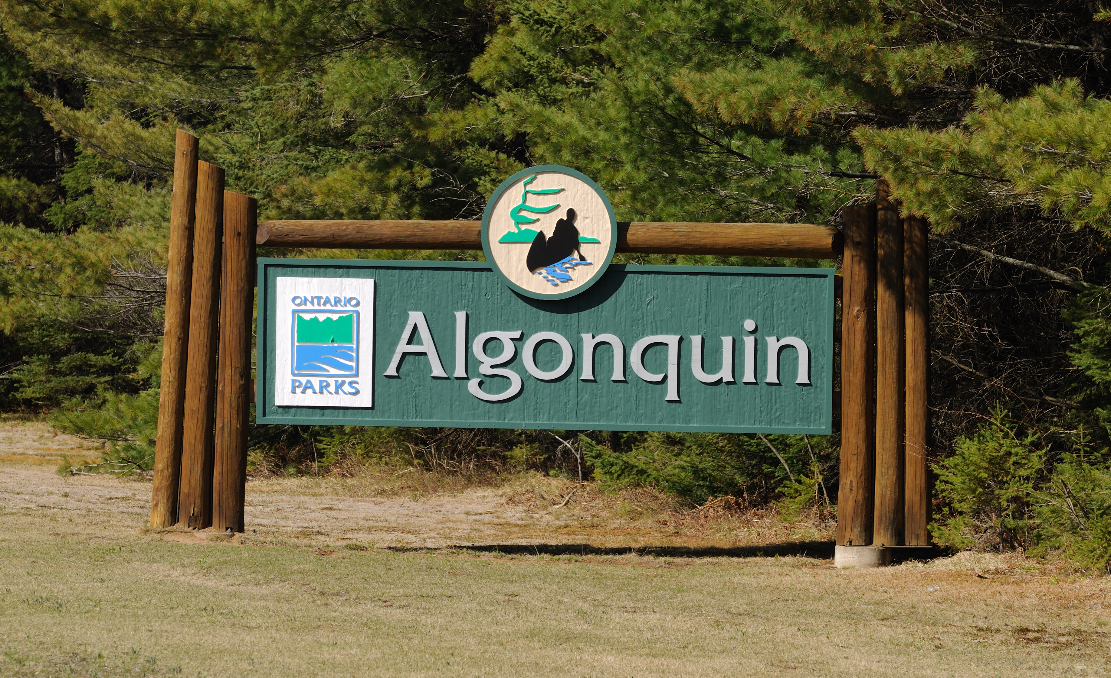 Algonquin Provincial Park: Hinweisschild